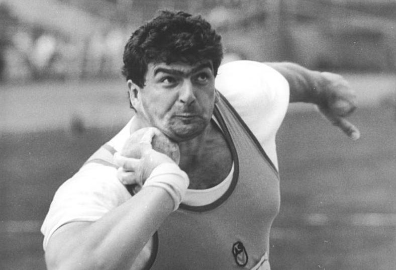 Udo Beyer ADN-ZB Thieme 12.6.88 Karl-Marx-Stadt: Leichtathletik-"Erzgebirgskristall"- Die 22,05 M, mit denen Exweltrekordler Udo Beyer (ASK Vorwärts Potsdam) den Kugelstoß-Wettbewerb gewann, sind ein international anerkennenswertes Ergebnis.